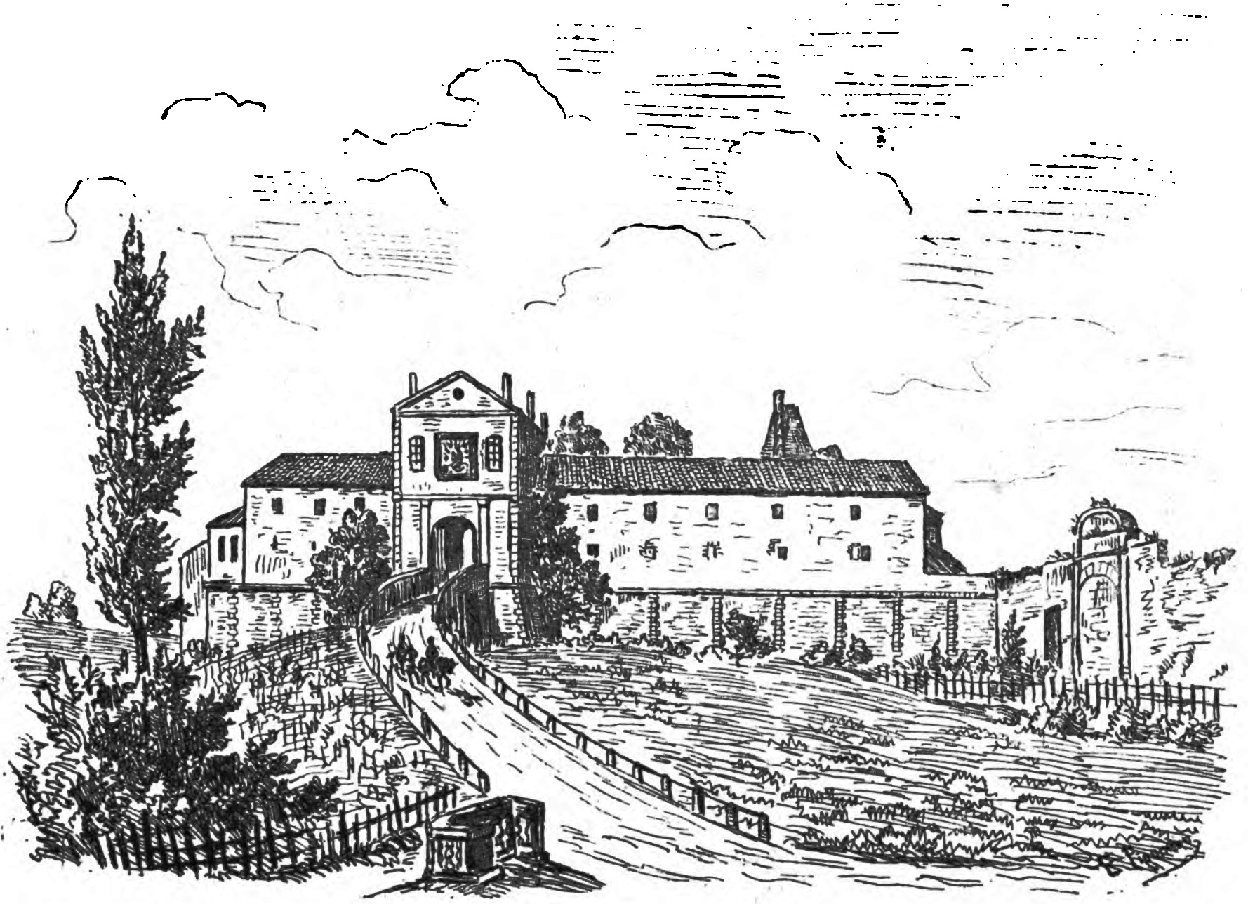 Ansicht des östlichen Wirtschaftsflügels von Schloss Lormont